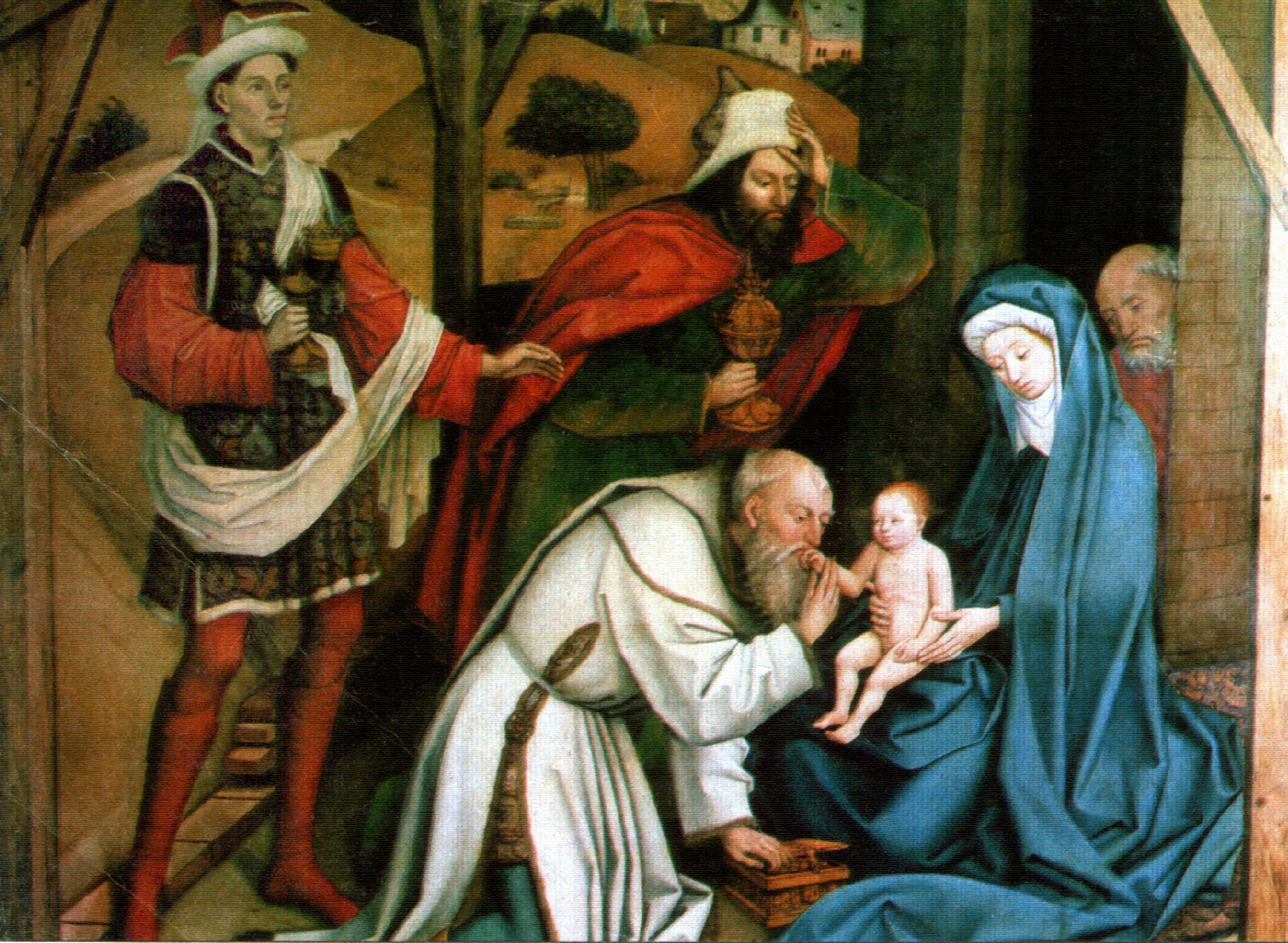 Anbetung der Könige, Altarbild von Hans Multscher (1400-1467)